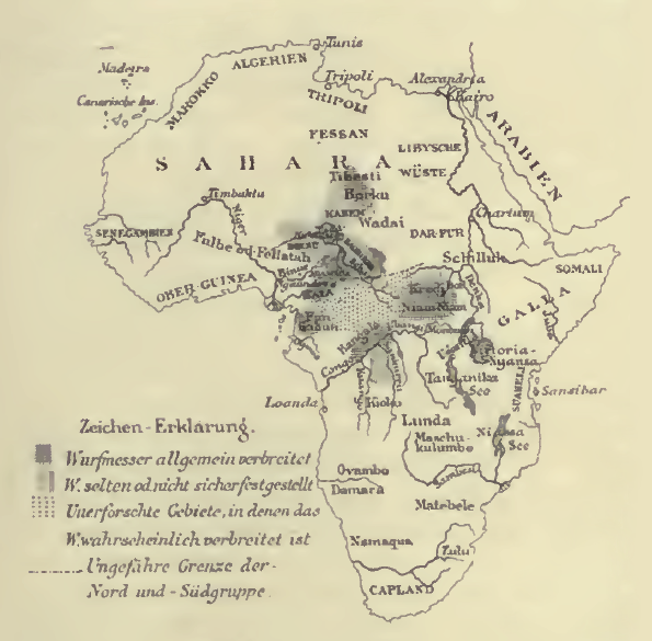 Verteilung von afrikanischen Wurfmessern nach Heinrich Schurtz